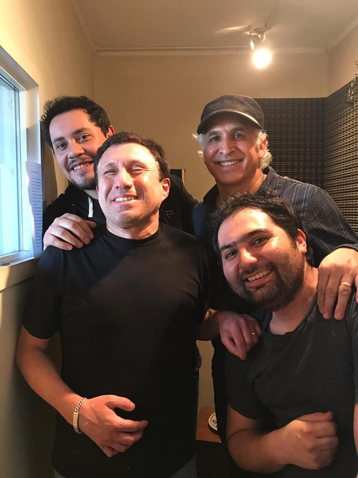 Vicente Baeza junto a los músicos Álvaro Scaramelli, Cristóbal Rojas Basso y Juan Pablo Ortega durante la grabación del single "Ciudad amurallada"